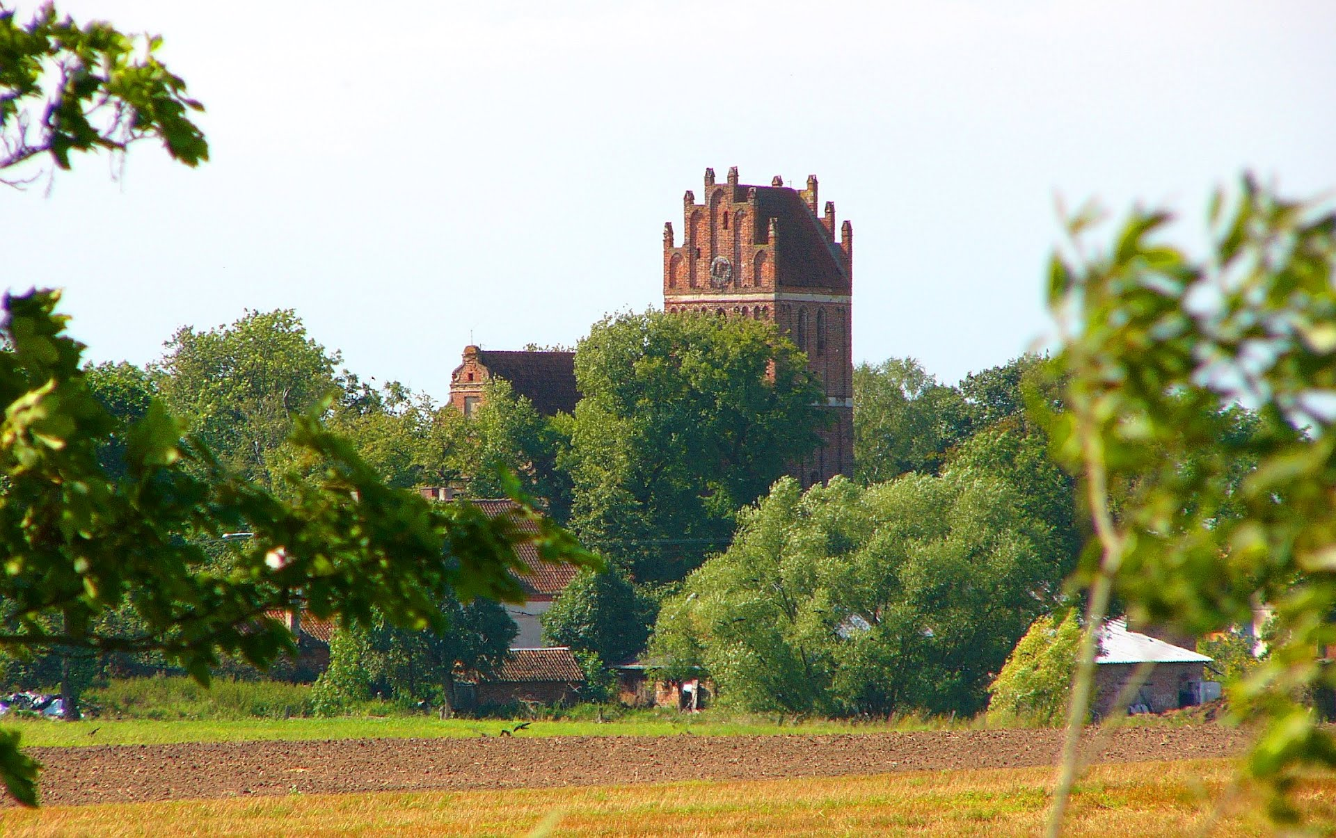 Parys - gotycki kościół z wyposażeniem wnętrza i cmentarzem (zabytek nrA-113)